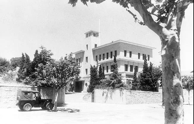 青岛原市委办公楼，原日本海军俱乐部“水交社”